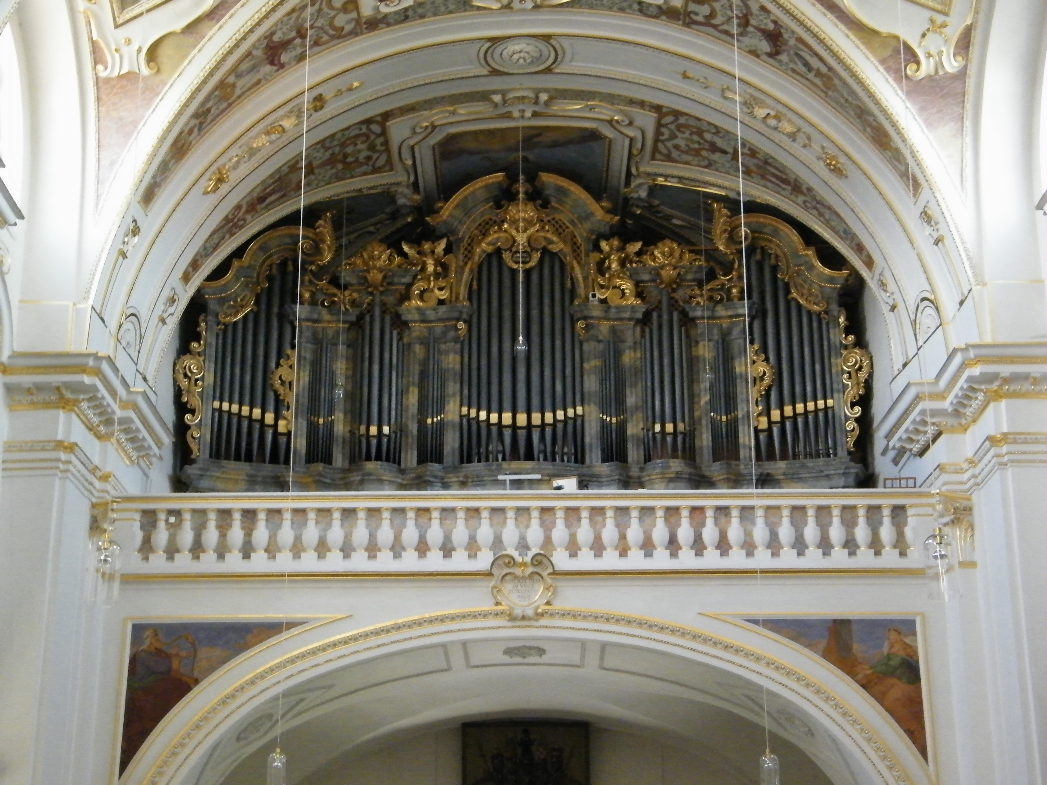 Hauptorgel der St.-Lorenz-Kirche in Kempten